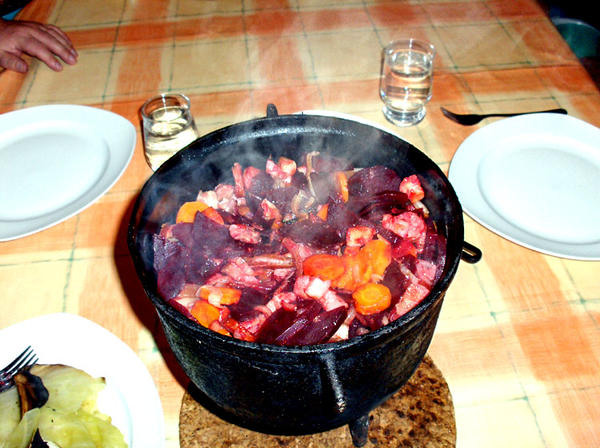 Prażonki w kociołku